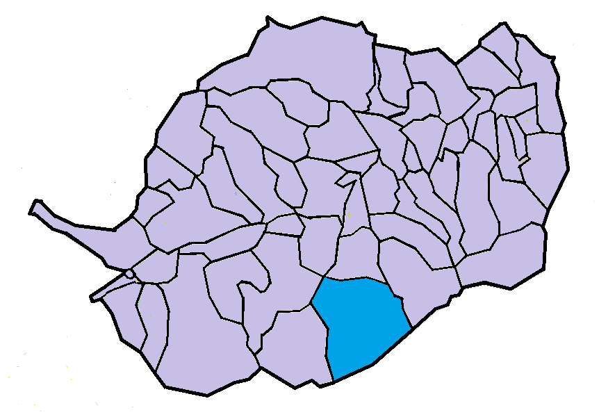 Pi de Conflent a la seva comarca, a partir del mapa municipal del Conflent de lliure disposició adaptat al Nomenclàtor toponímic aprovat el 2007